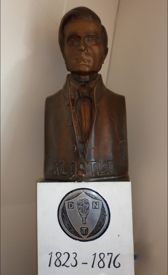 Byste av Asbjørn Kloster på Totalen i Stavanger.